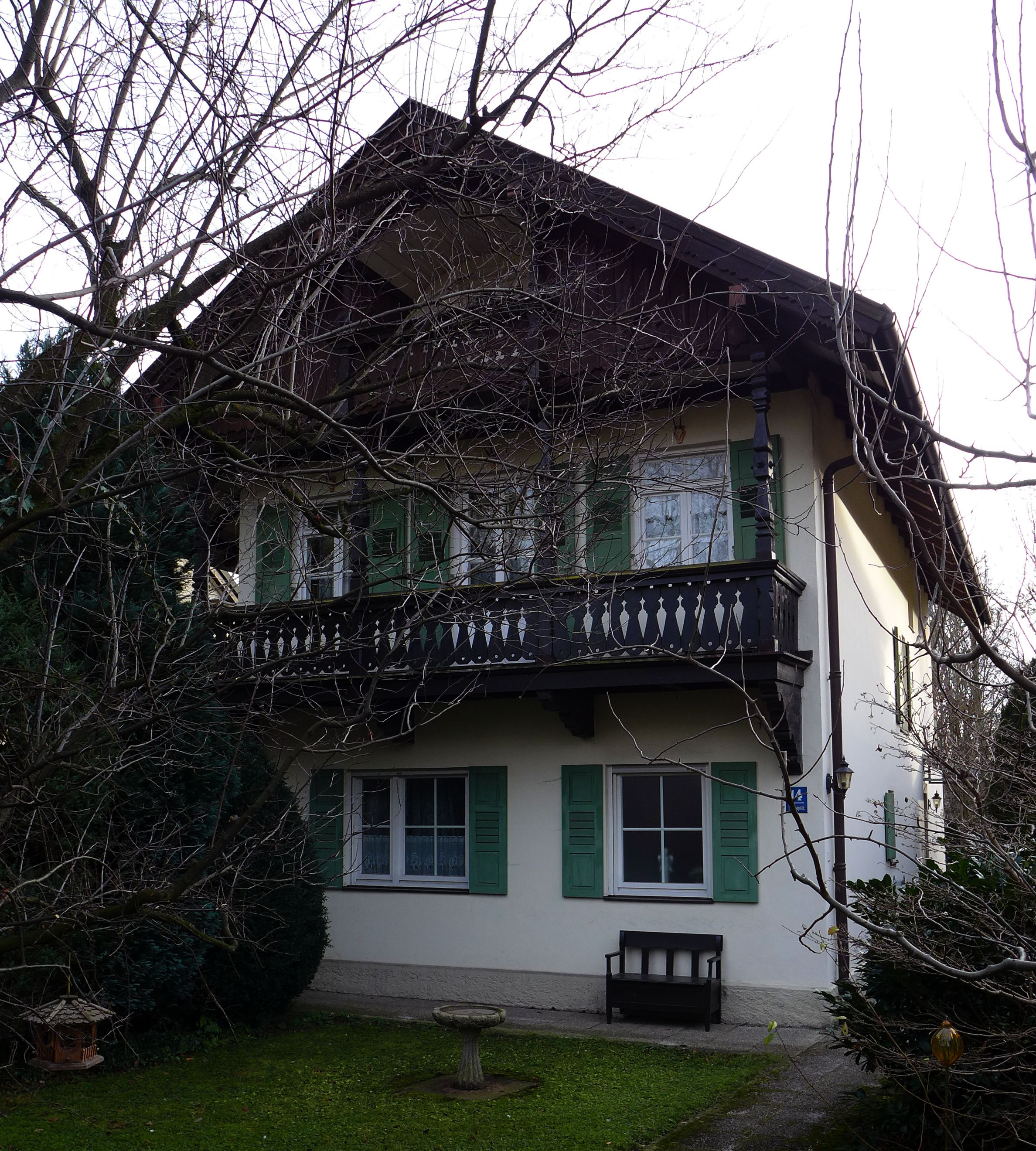 Marsopstr. 14, München